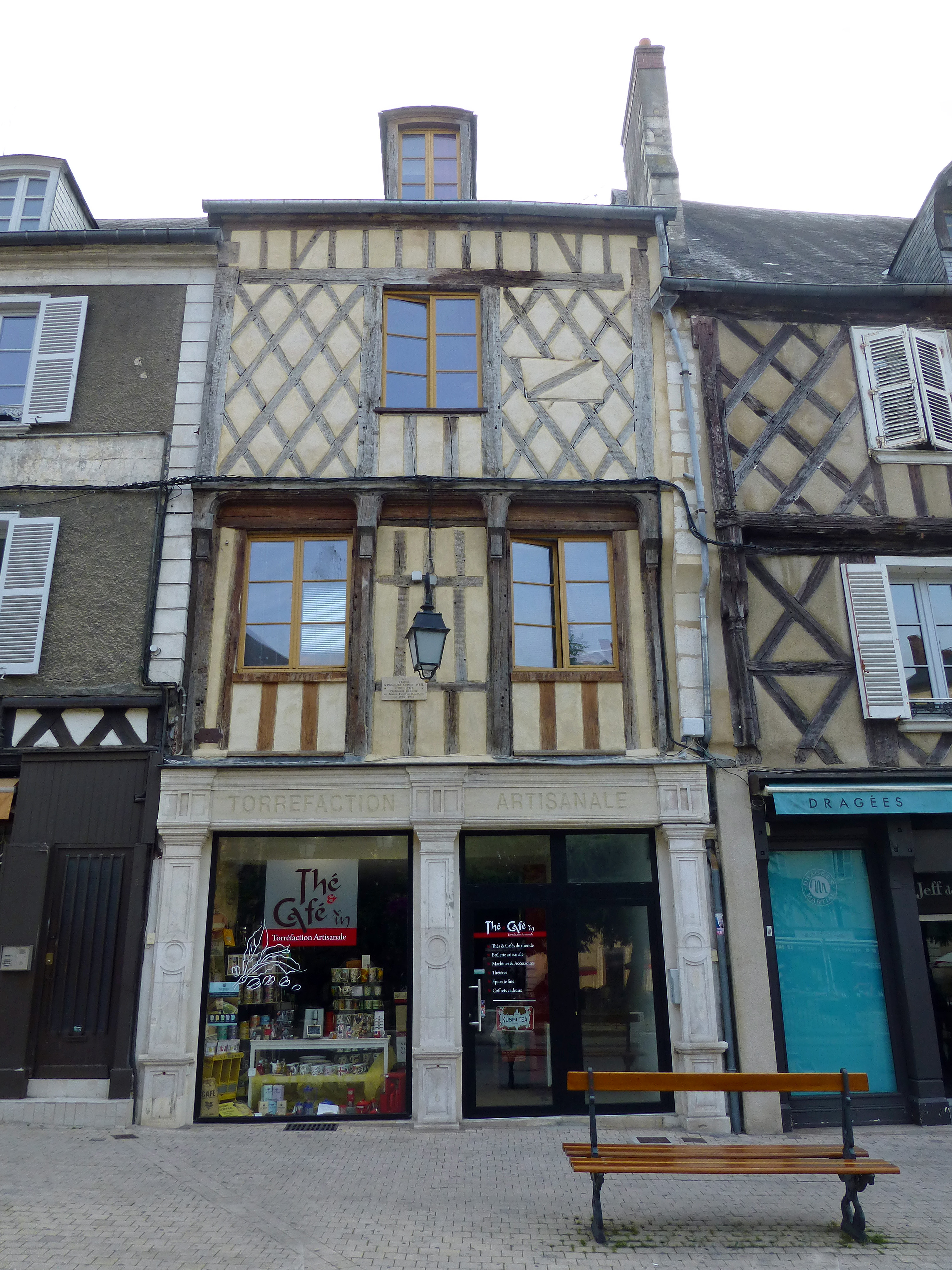 Bourges (Cher), 7, place Gordaine : maison où vécut la philosophe Simone Weil lorsqu'elle était professeur au Lycée de Jeunes Filles en 1935-1936